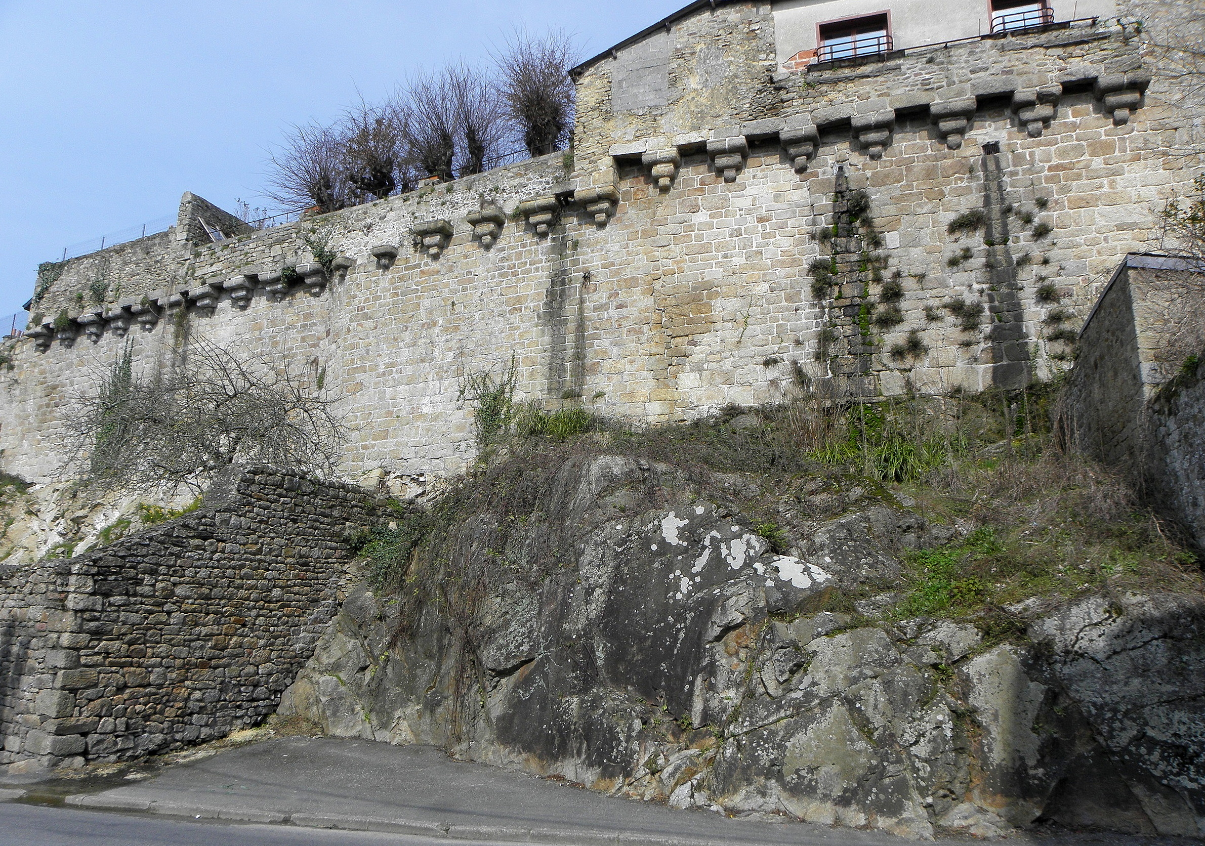 Remparts de Guingamp (22). Murs sud entre le Château et la Porte de Toulquellenic.